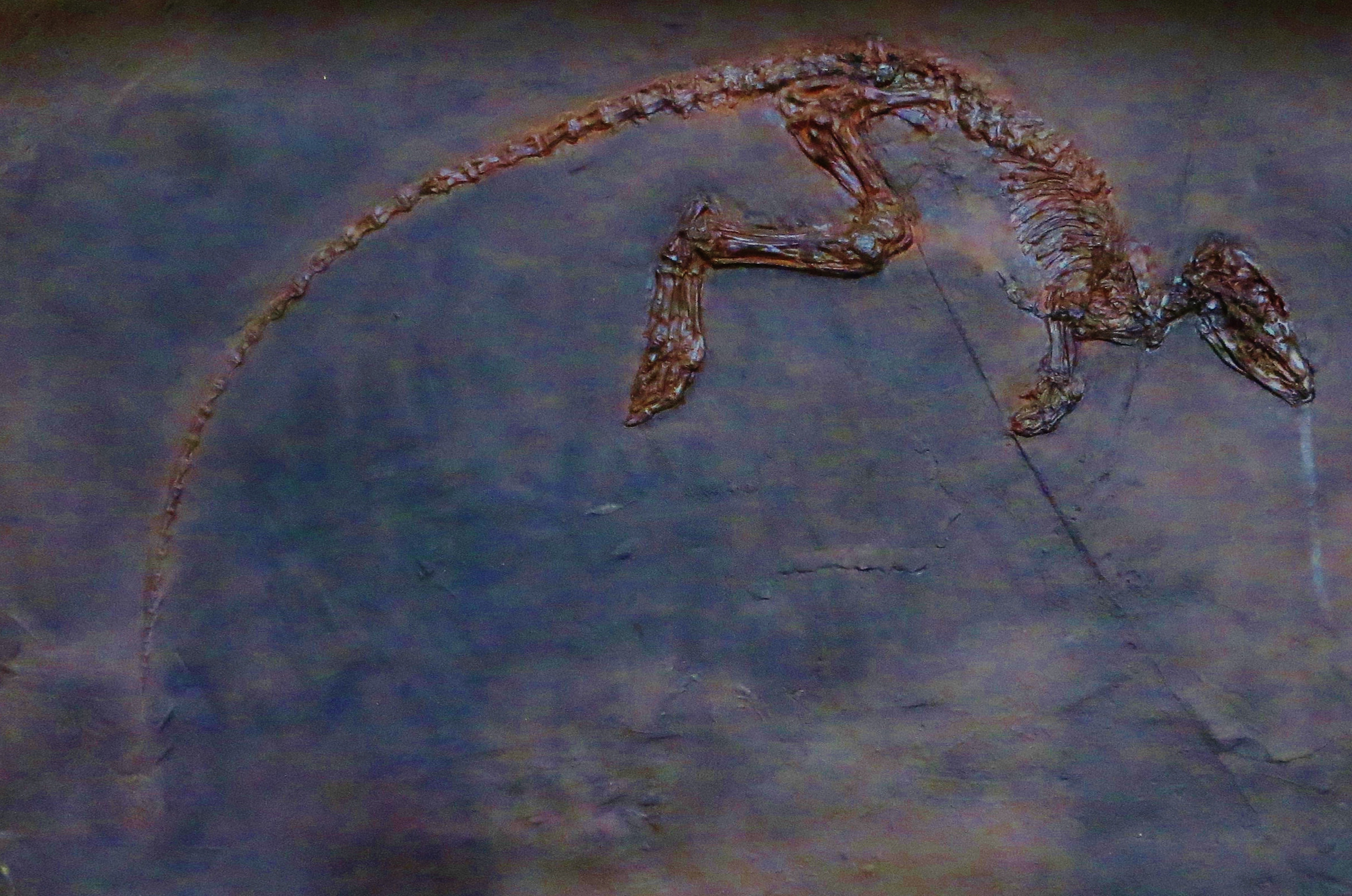 Fossil of Leptictidium, an extinct mammal- Took the photo at Musee d'Histoire Naturelle, Paris